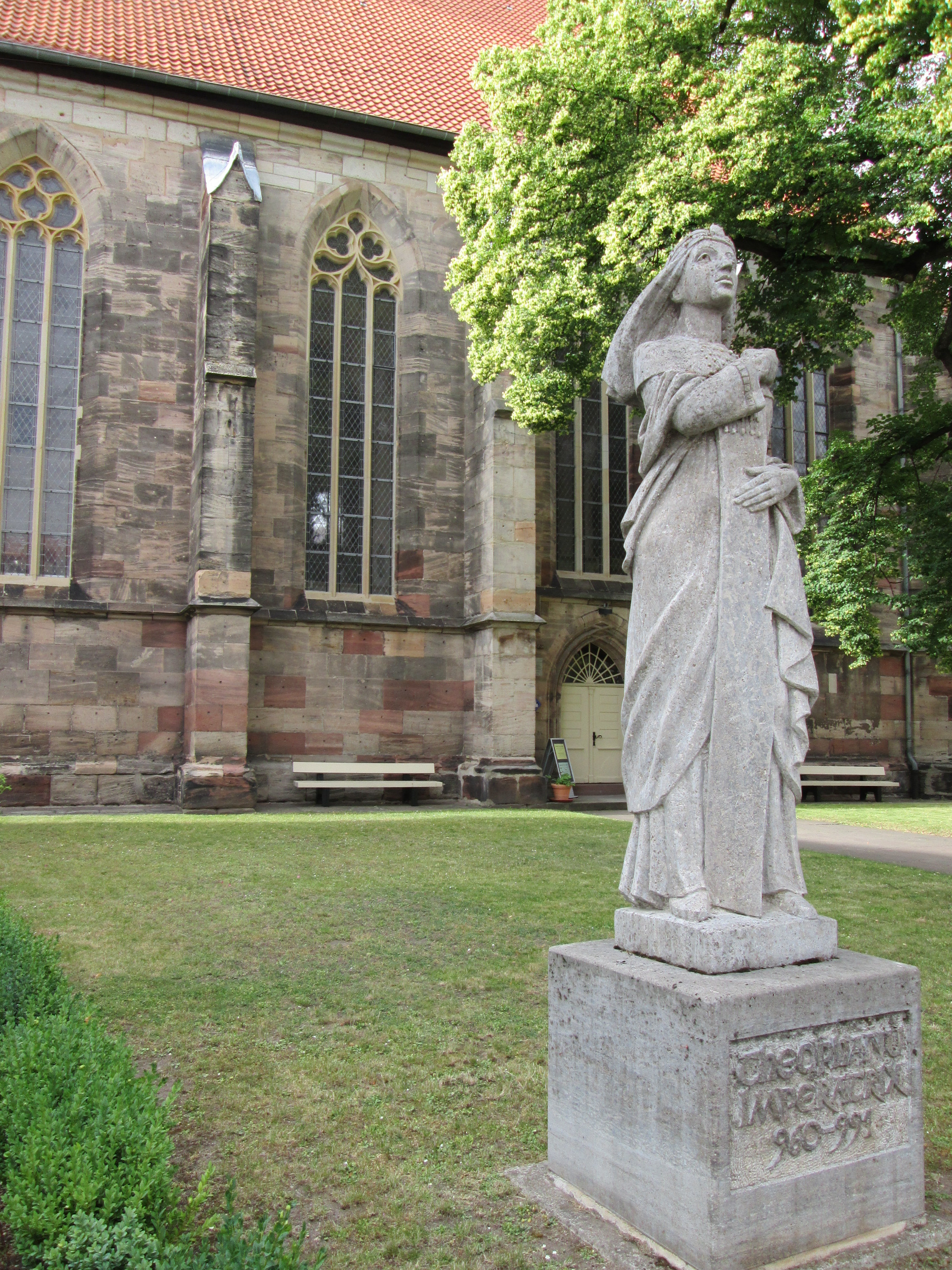 Denkmal der römisch-deutschen Kaiserin Theophanu - Eschwege Marktkirche